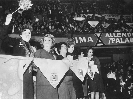 Mujeres en la campaña de Allende, entre otras aparecen Mireya Baltra y Maria Maluenda.